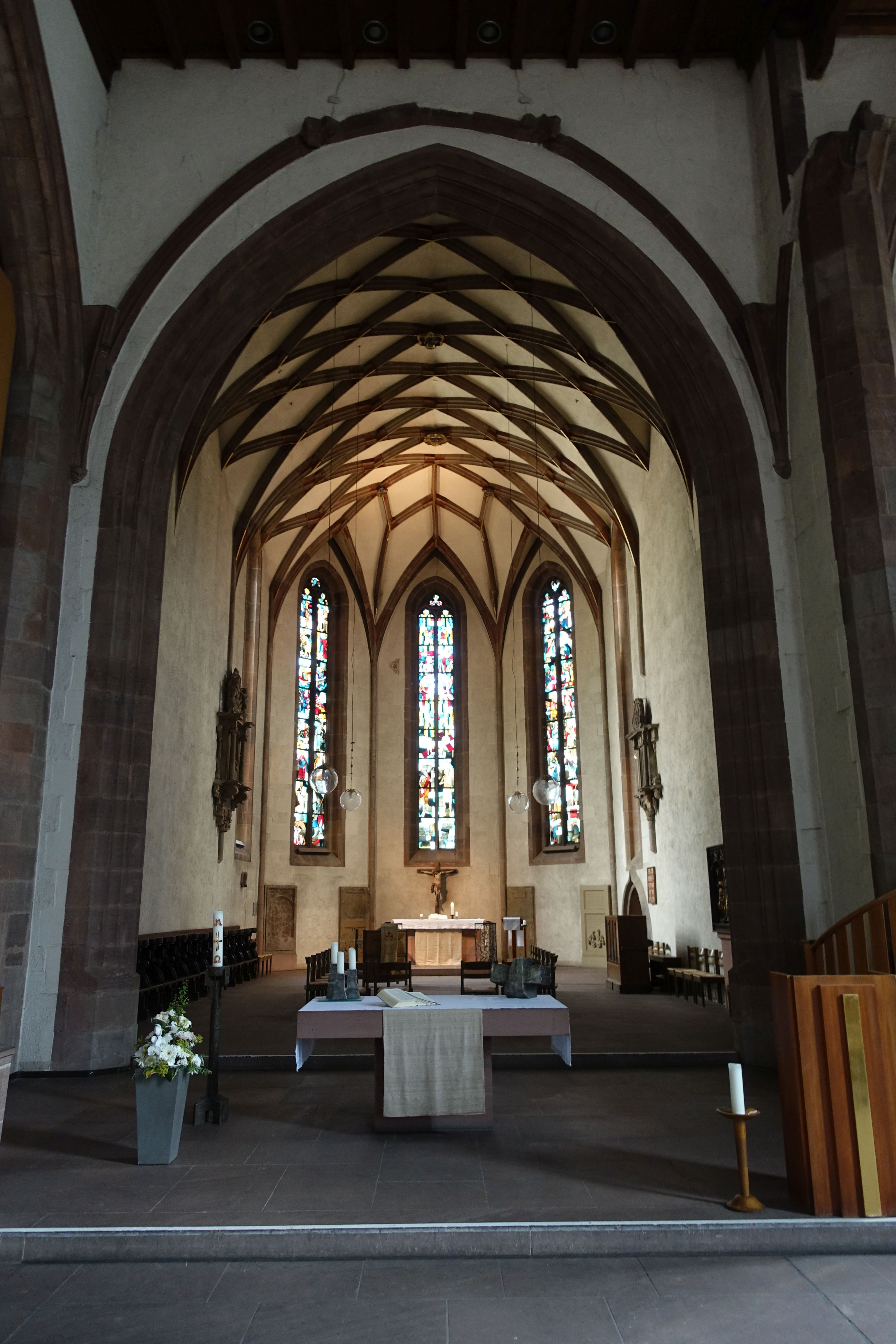 Leonhardskirche Stuttgart, Chor mit Triumphbogen.